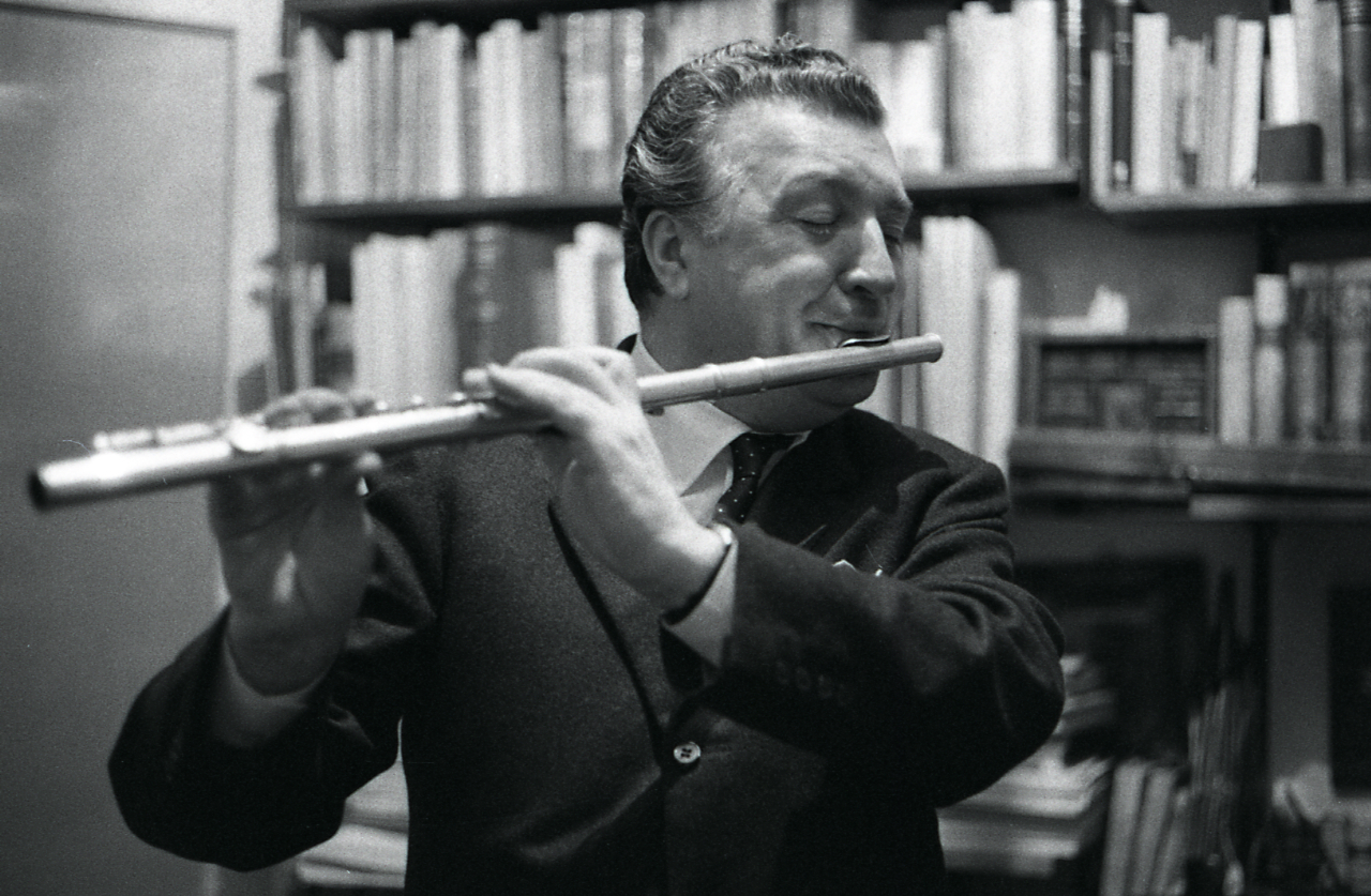 Servizio fotografico : Brescia, 1964 / Paolo Monti. - Strisce: 3, Fotogrammi complessivi: 16 : Negativo b/n, gelatina bromuro d'argento/ pellicola ; 35 mm. - ((I fotogrammi hanno una doppia numerazione. - Sul portanegativi: Pentax HP3. - Sul dorso e sul portanegativi Monti individua questa serie con la lettera "B". - Fonte: Agenda di Paolo Monti: Foto Leica 2 / 111 - 285 (1934-1965), presso Archivio Paolo Monti